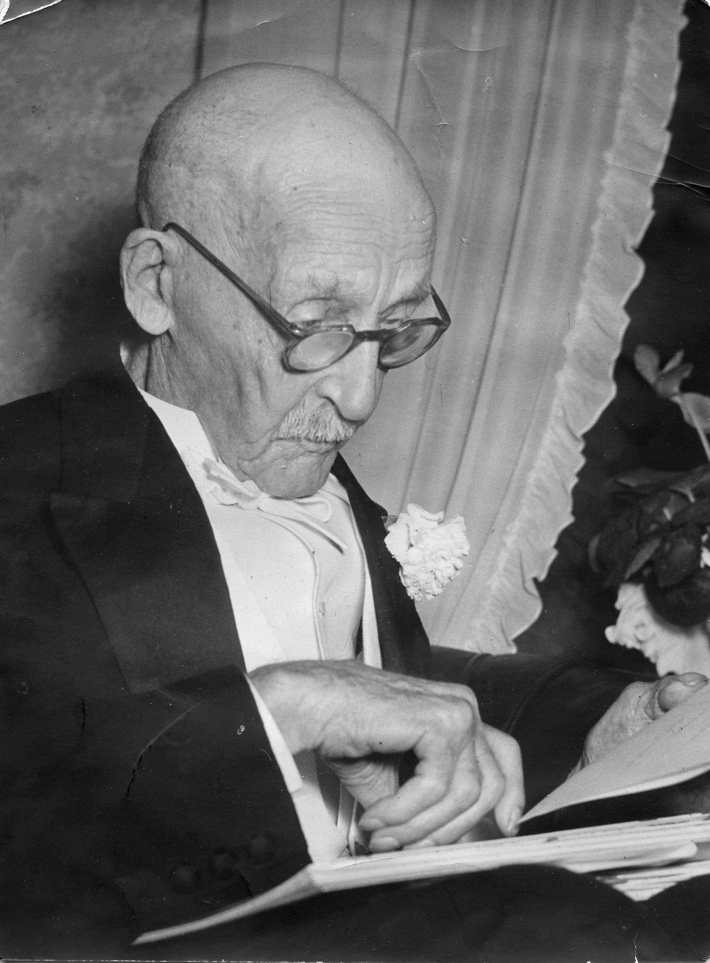 H.P. Jacobsen. Grunnlegger av Langesund mekaniske verksted